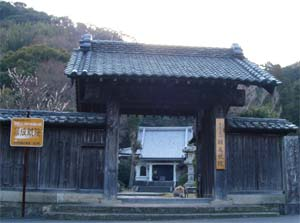 願成就院 山門 Ganjoju-in, Izonokuni, Shizuoka, Japan 撮影者 fuyu 本人